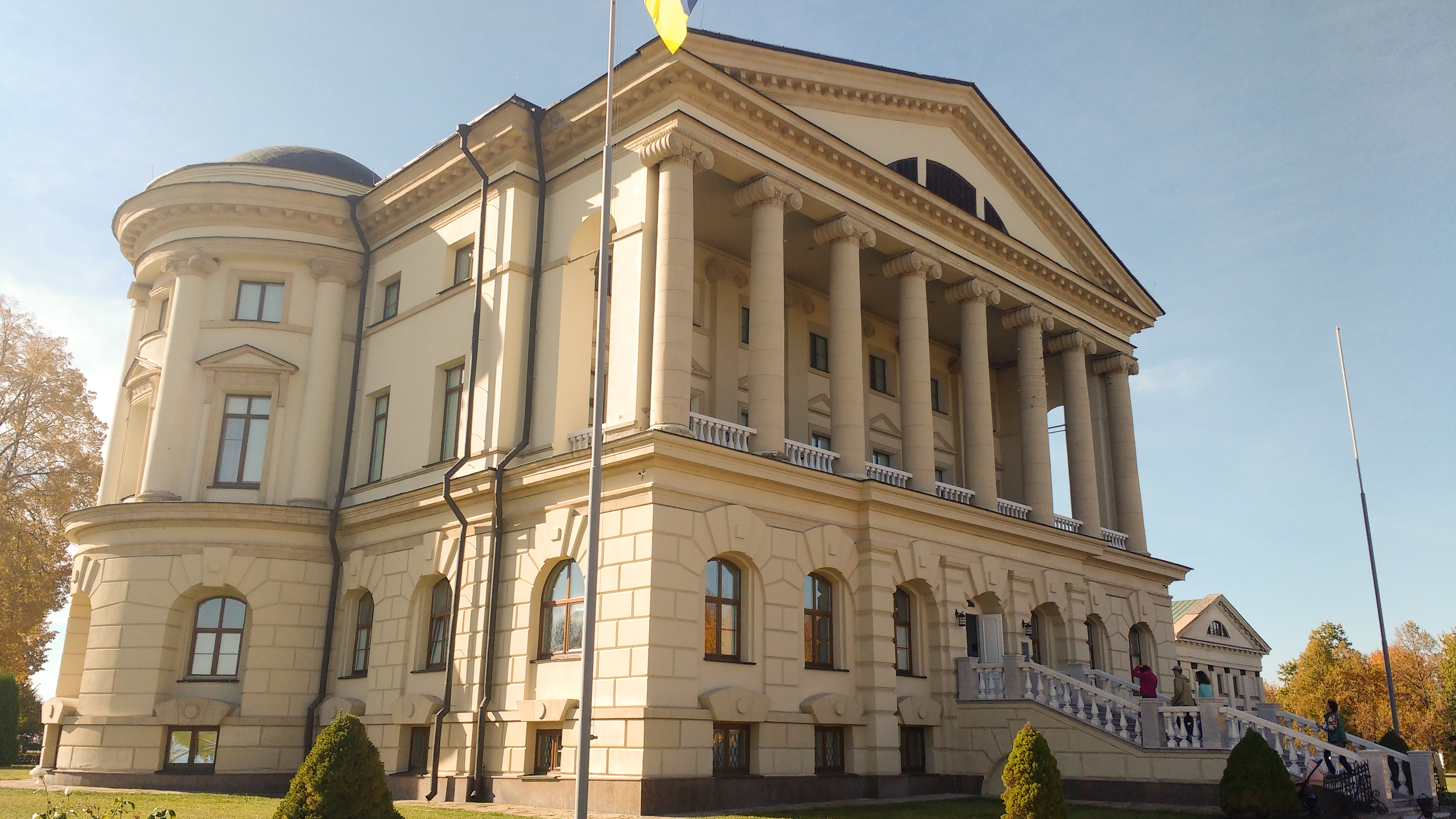 Палац К.Розумовського (мур.), Батурин, вул.Набережна, 1